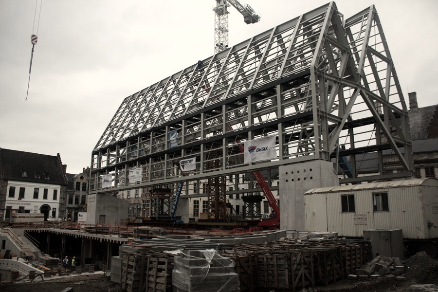 Stalen skelet van de stadshal